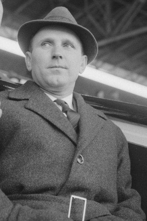 De Hongaarse coach Nandor Hidegkuti op de tribune bij de wedstrijd DWS - Fortuna '54